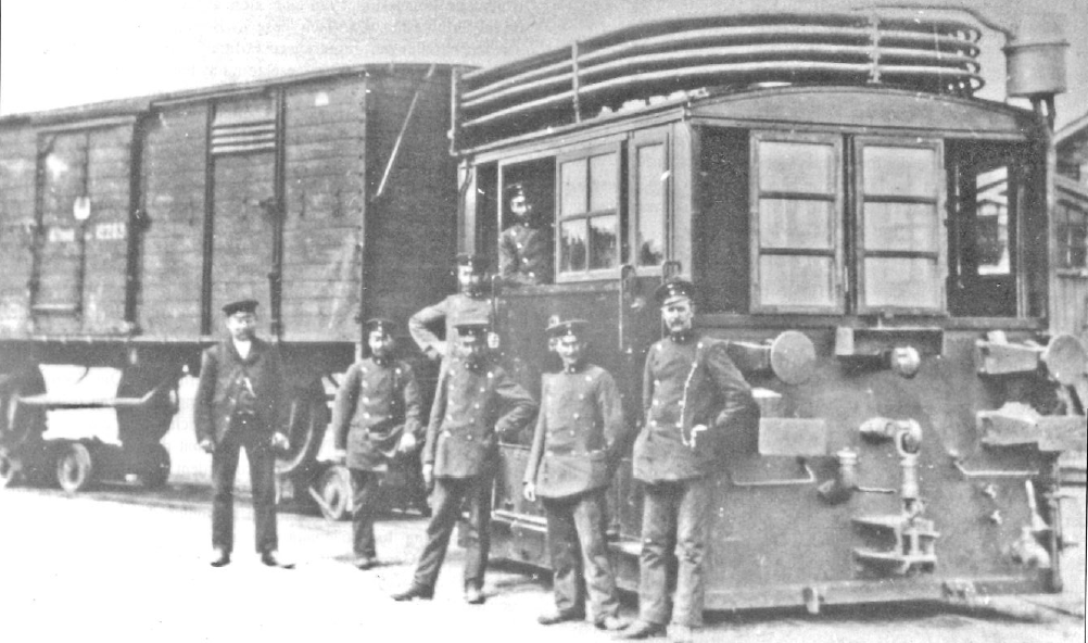 Kastendampflokomotive Ottensener Industriebahn Nr. 3 auf einer historischen Aufnahme